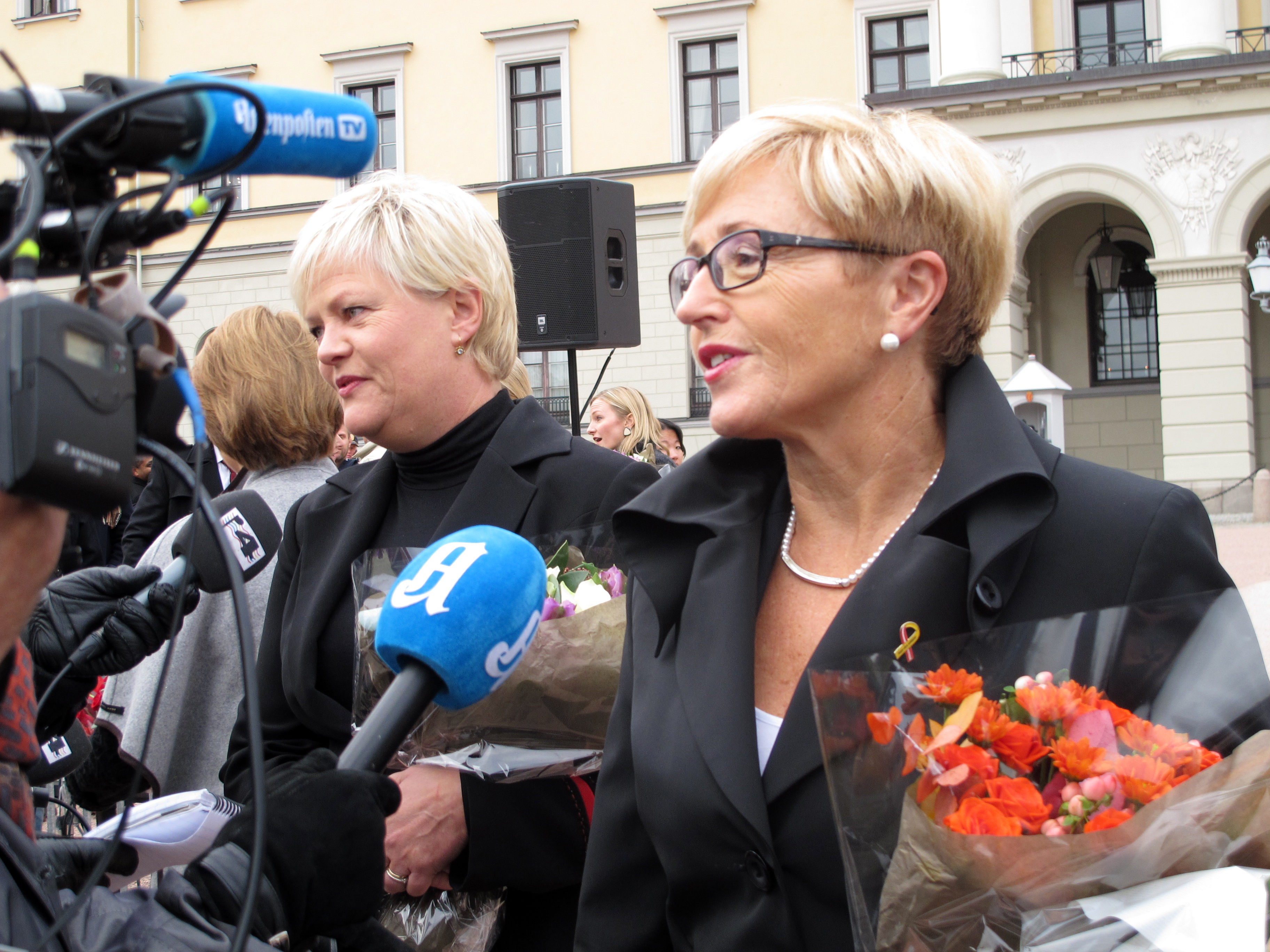 Kristin Halvorsen and Liv Signe Navarsete